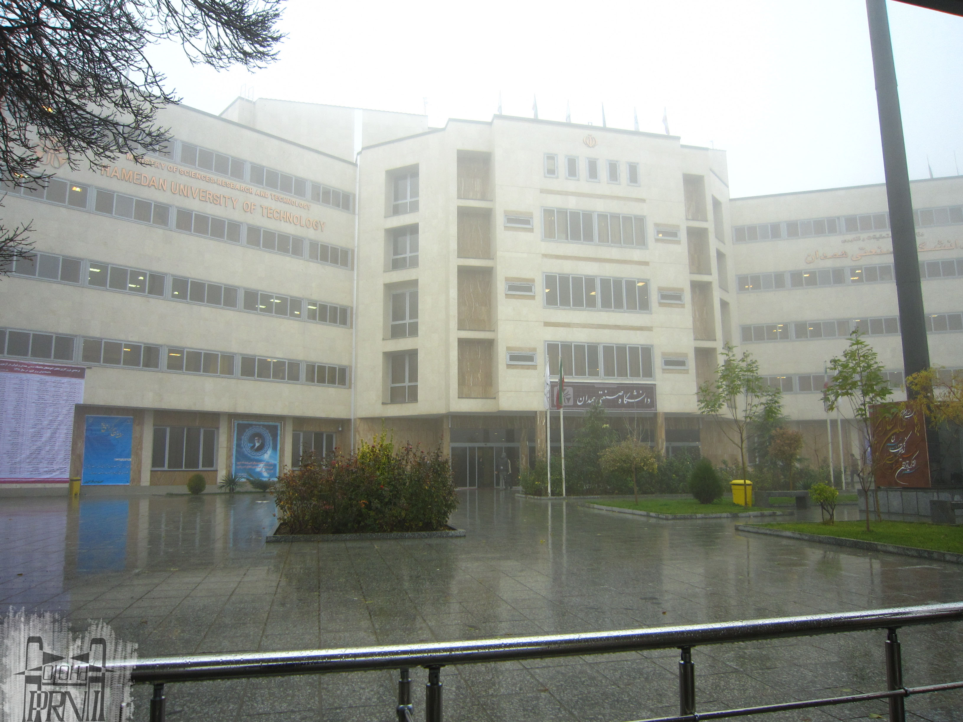 عکاس محمد حسین پرنی